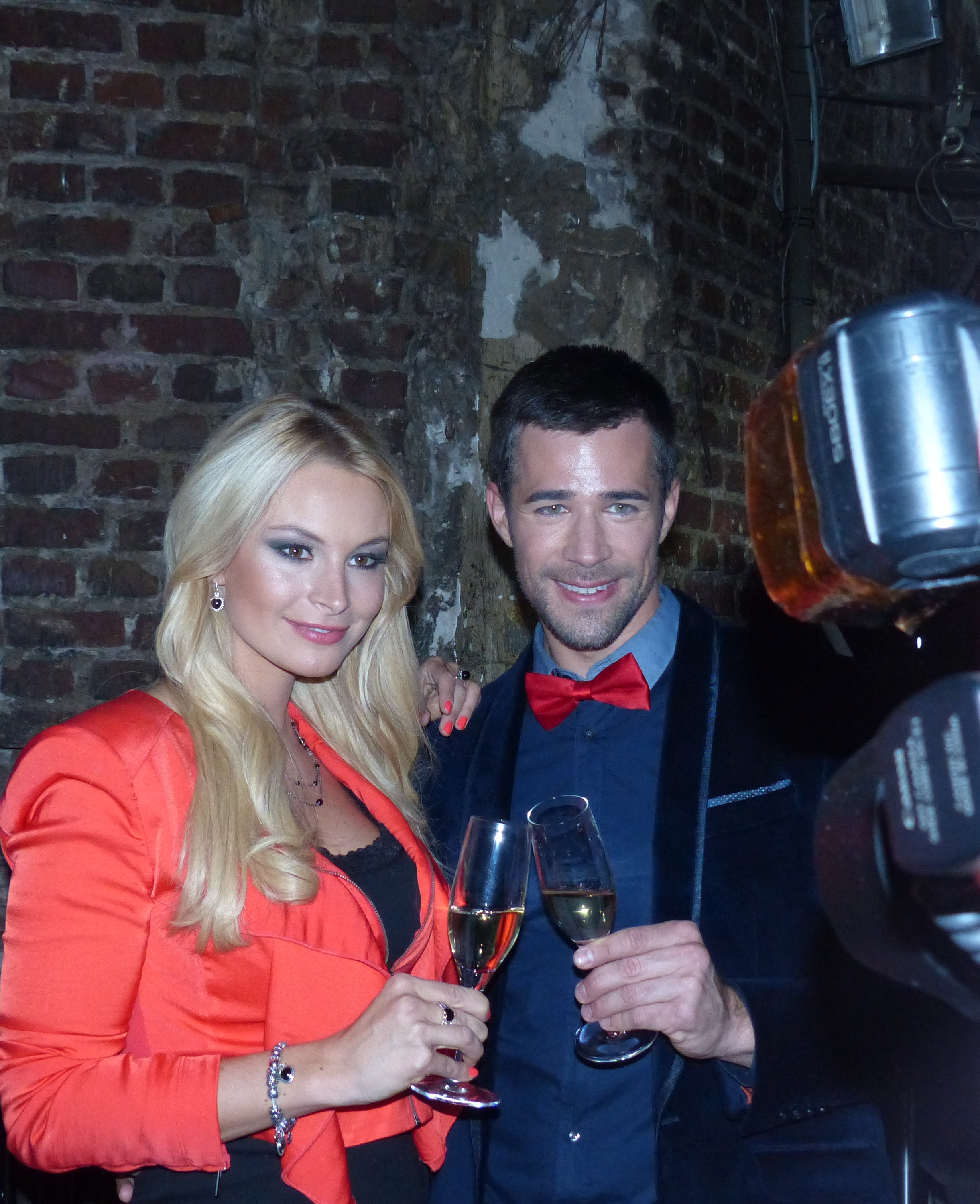 Jana Julie Kilka, Jo Weil, 18. Jahre Verbotene Liebe Party, Düsseldorf